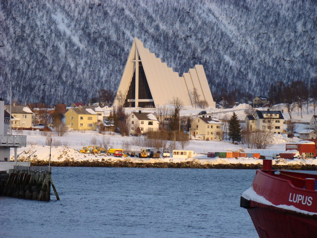 Ishavskatedralen, Tromsø